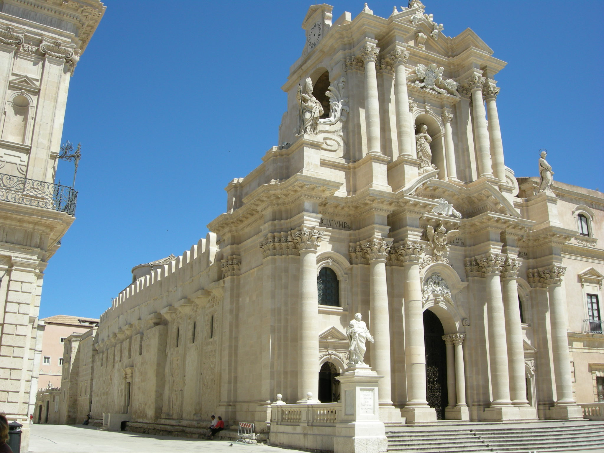 Ortigia, duomo, facciata